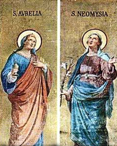 Santa Aurélia e Santa Neomísia